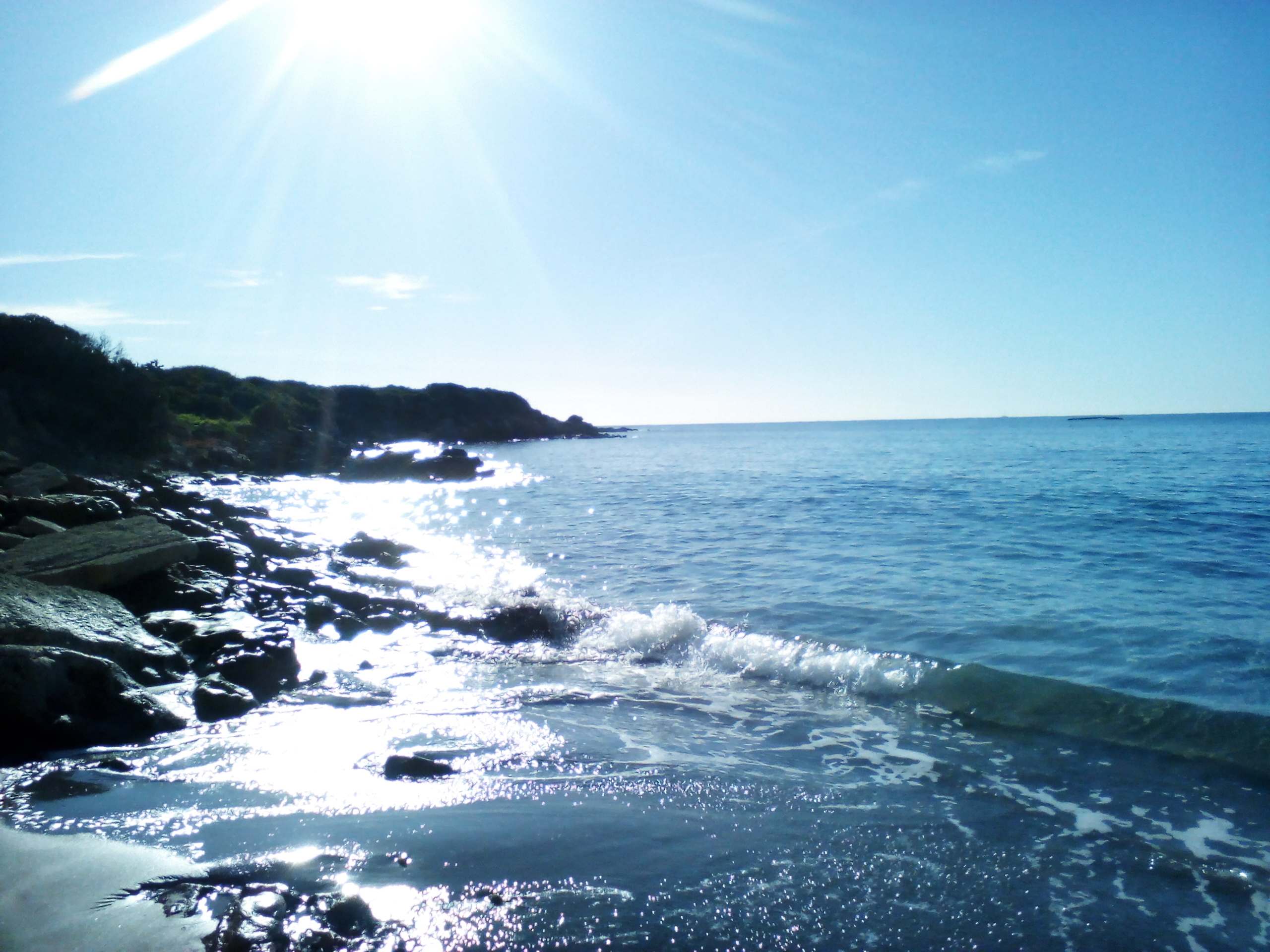 Costa della Fanusa (Siracusa)